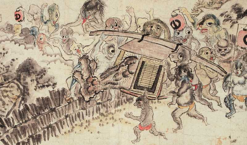 Sanmoto Gorozaemon (山本五郎左衛門) from the Inō Mononokeeoku Emaki (稲生物怪録絵巻)